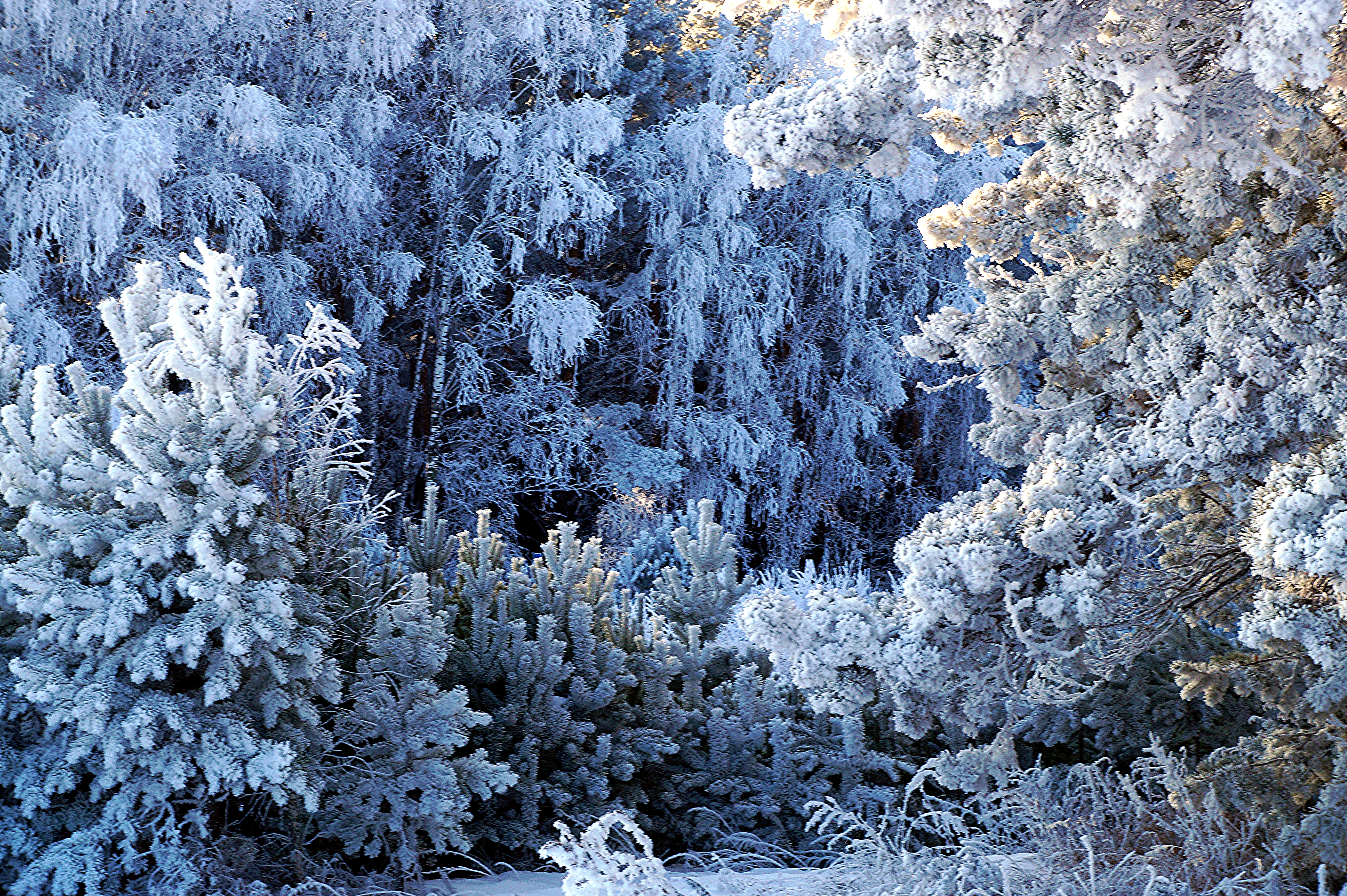 Перовское лесничество национального парка "Шушенский бор" находится в Минусинской котловине и представляет собой песчаные холмы, поросшие преимущественно сосной обыкновенной. Фото Элинор Пэйт This image is related to the protected area of Russia number 2400223